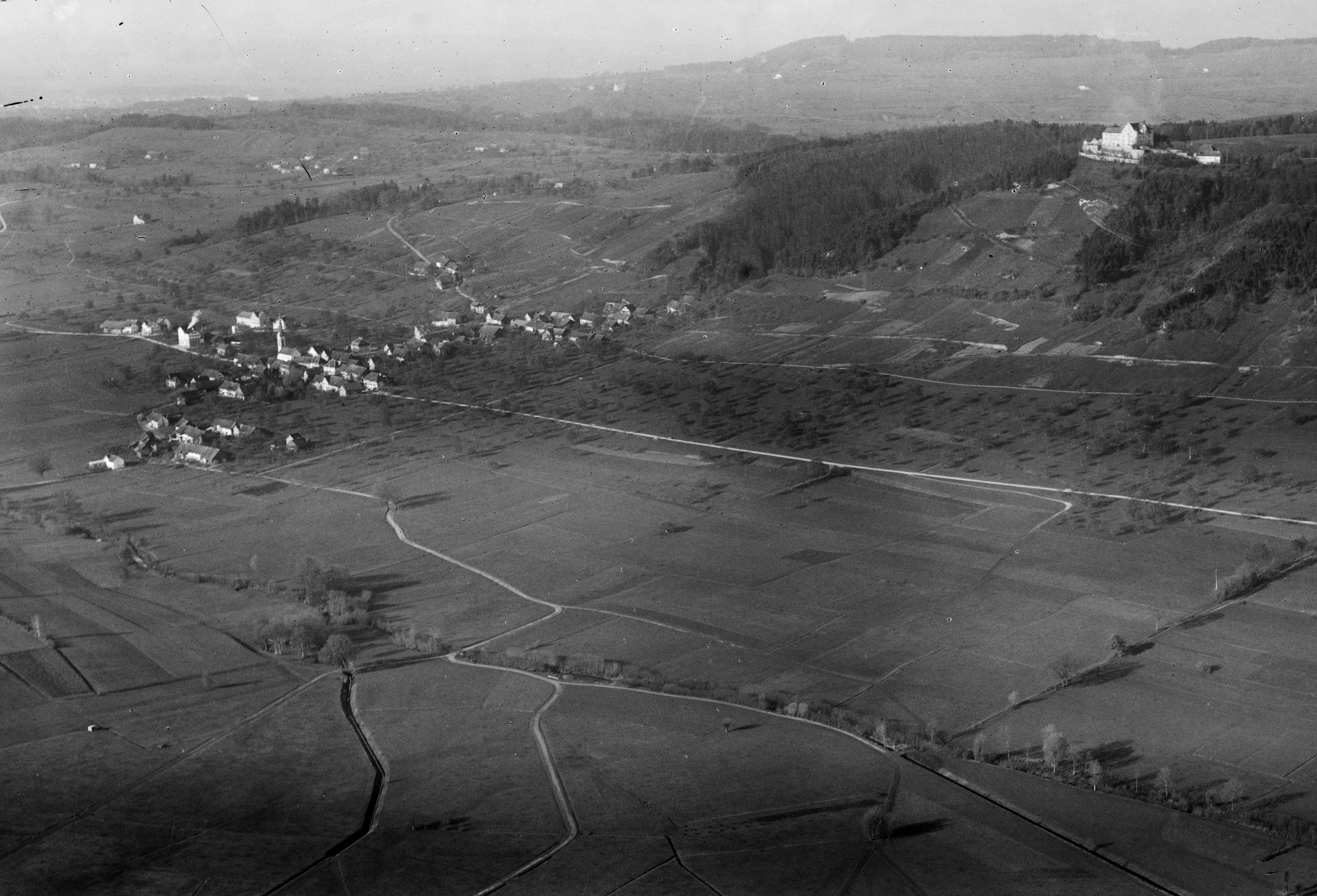 Stettfurt, Schloss Sonnenberg v. S. O. aus 400 mAusschnitt aus einer Foto von Walter Mittelholzer